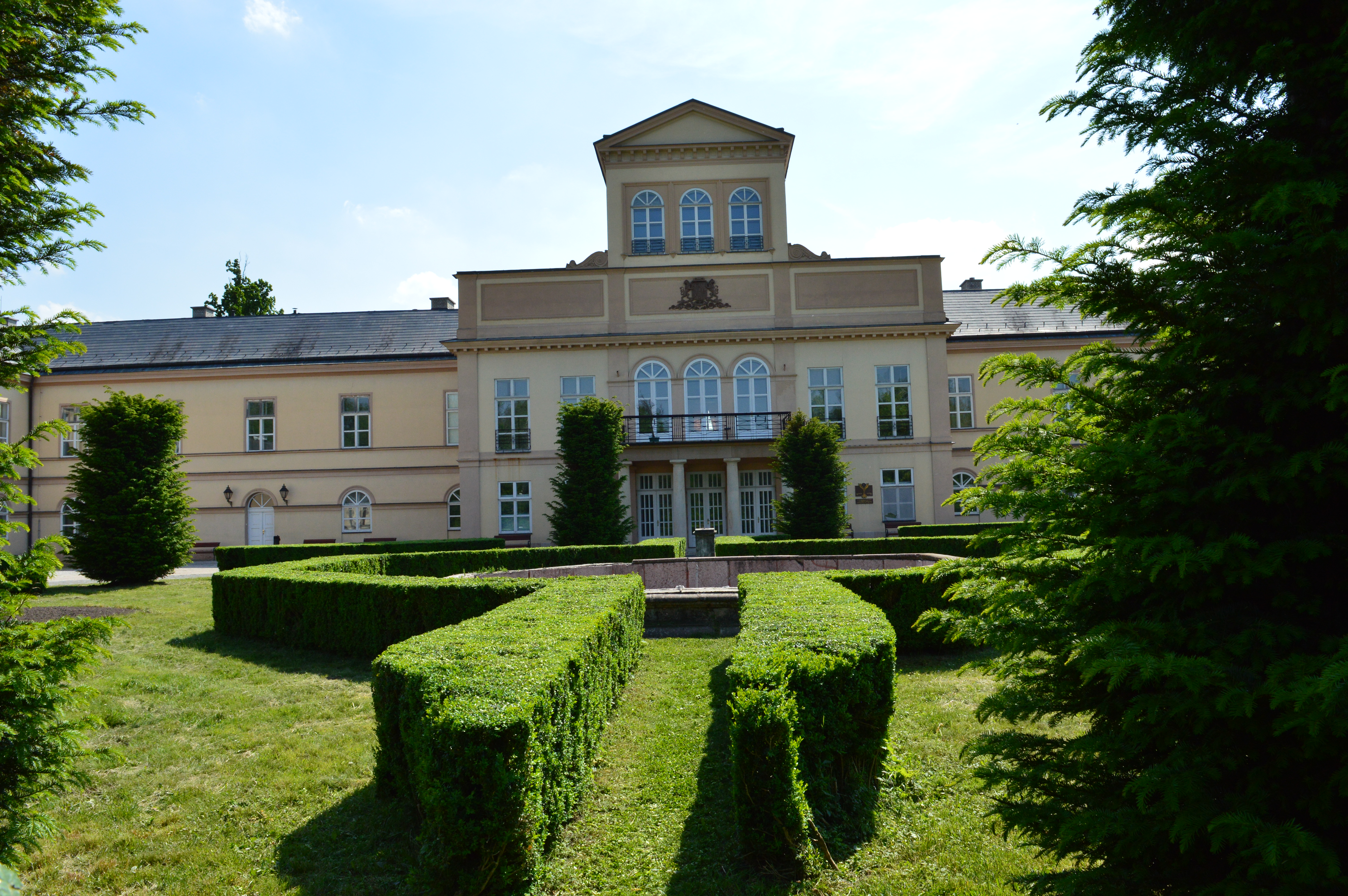 Kaštieľ